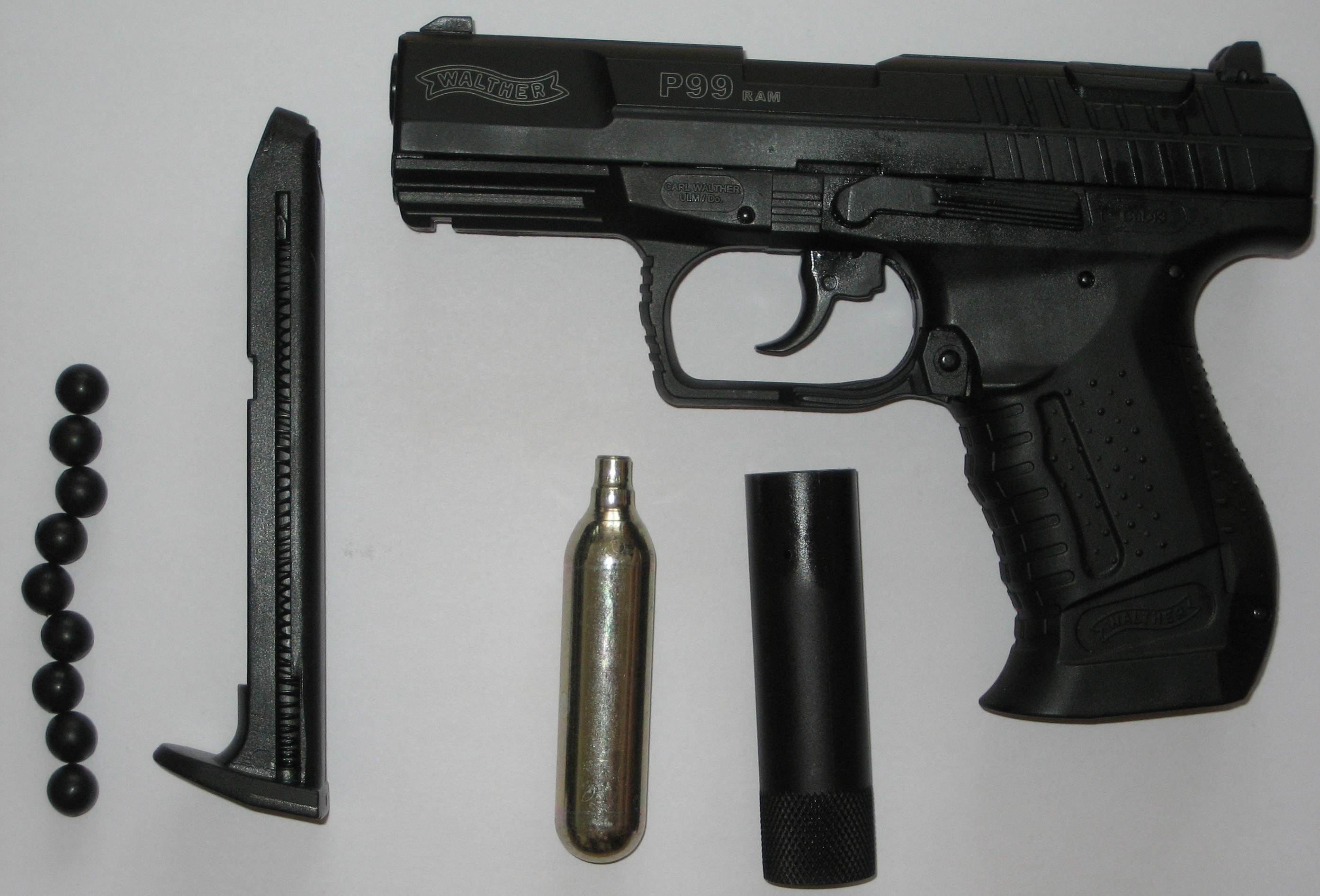 P99 RAM